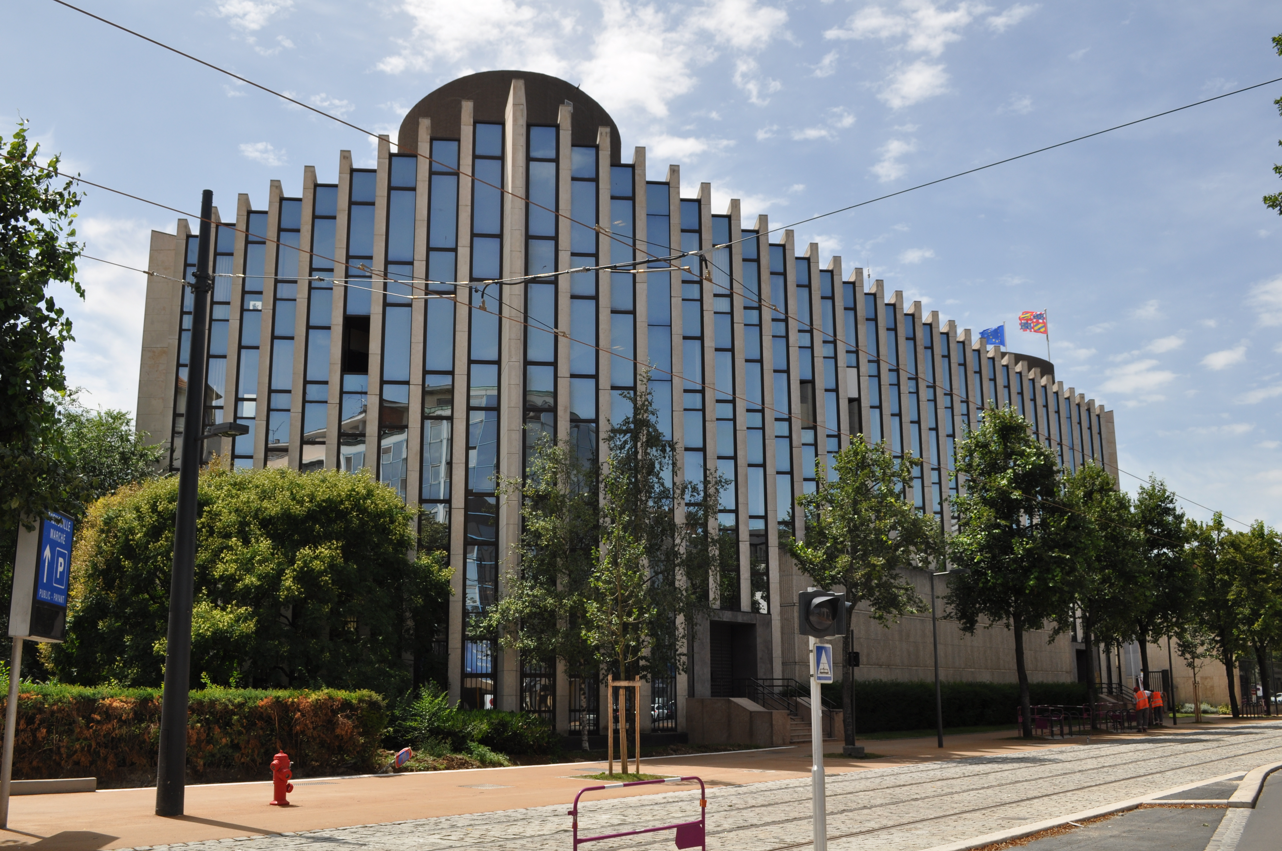 Façade du Conseil Régional de Bourgogne, à Dijon.